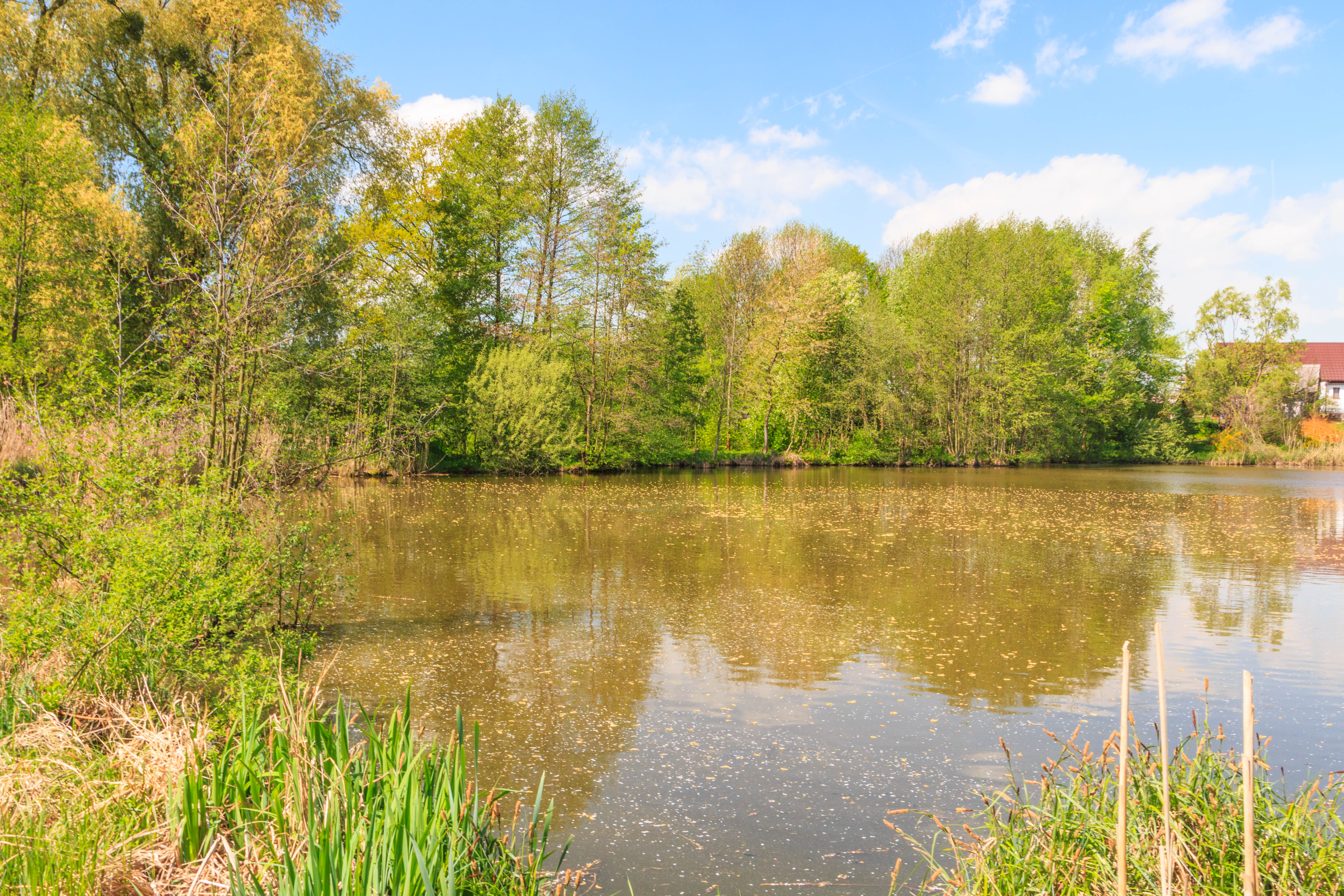 Nákelský rybník Project: Vodstvo